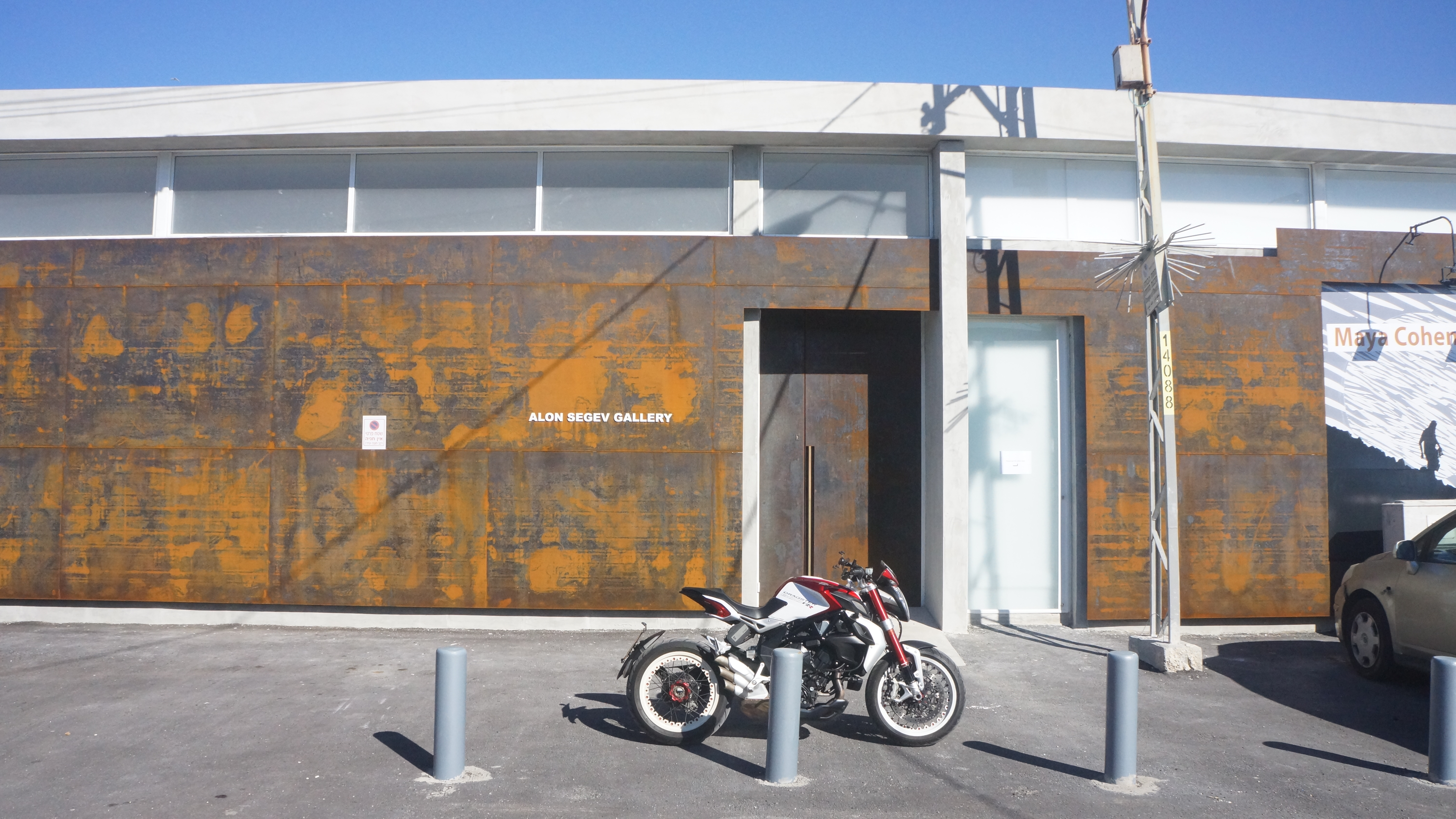 גלריה אלון שגב